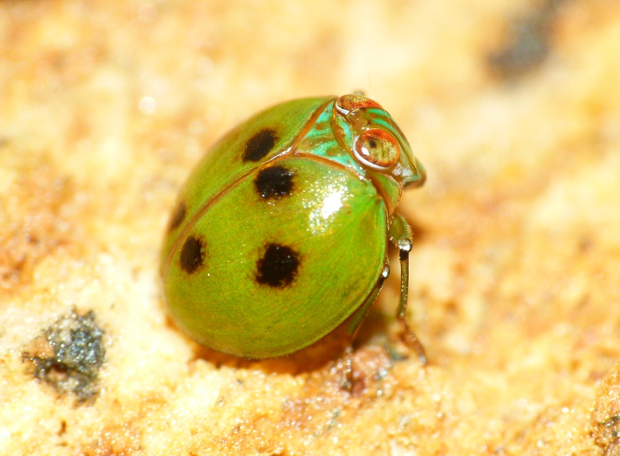 Gergithus sp., Issidae. Wynaad, India